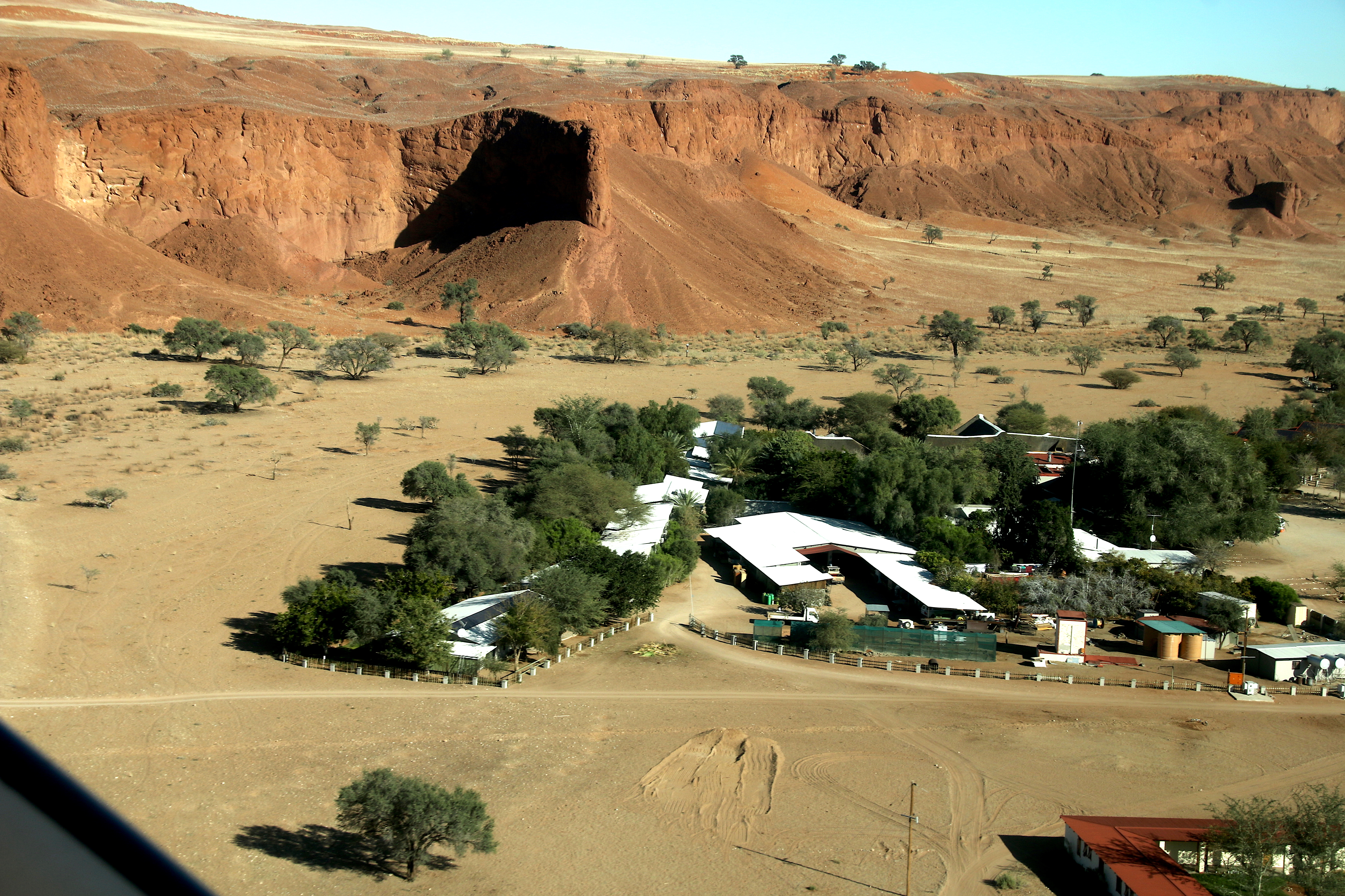 Versteinerte Dünen bei Gondwana Namib Desert Lodge (2018)